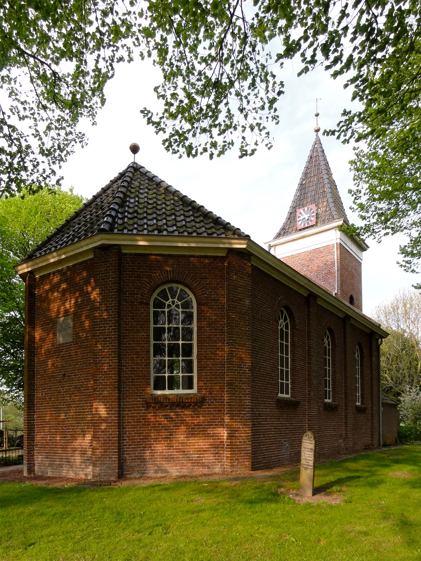 Kerk van Borgsweer